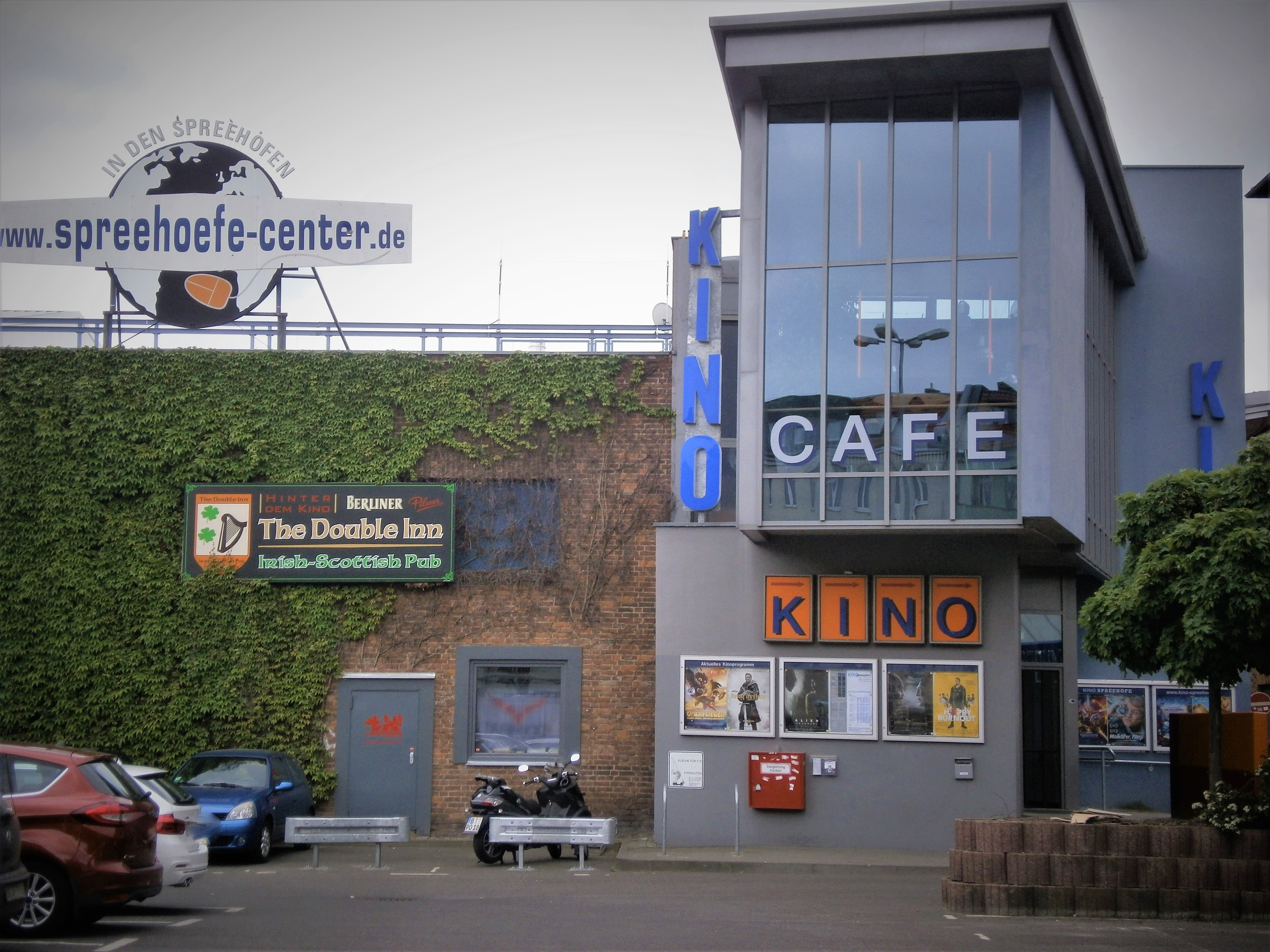 Wilheminenhofstraße ist eine Straße im Berliner Bezirk Treptow-Köpenick. Die Grundstücksfläche 89 gehört zum Ortsteil Oberschöneweide. An der Südseite der Straße zur Spree entstanden um 1910 Industrie- und Gewerbeanlagen. Nach dem Mauerfall änderte sich der Charakter der Fläche aus den Industriegebäuden westlich der Edisonstraße wurden der Gewerbepark der Spreehöfe gebildet. Hier wurde in zwei ehemaligen Produktionshallen 1998 ein Kino eingerichtet.